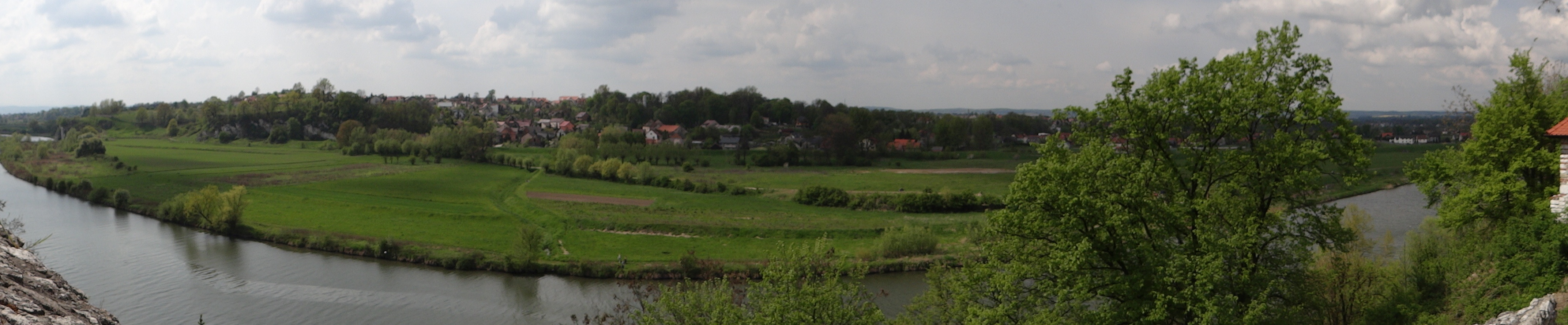 Piekary, widok z Tyńca